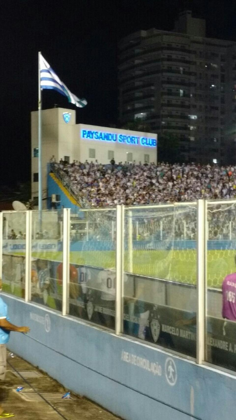 Hotel do Paysandu Sport Club